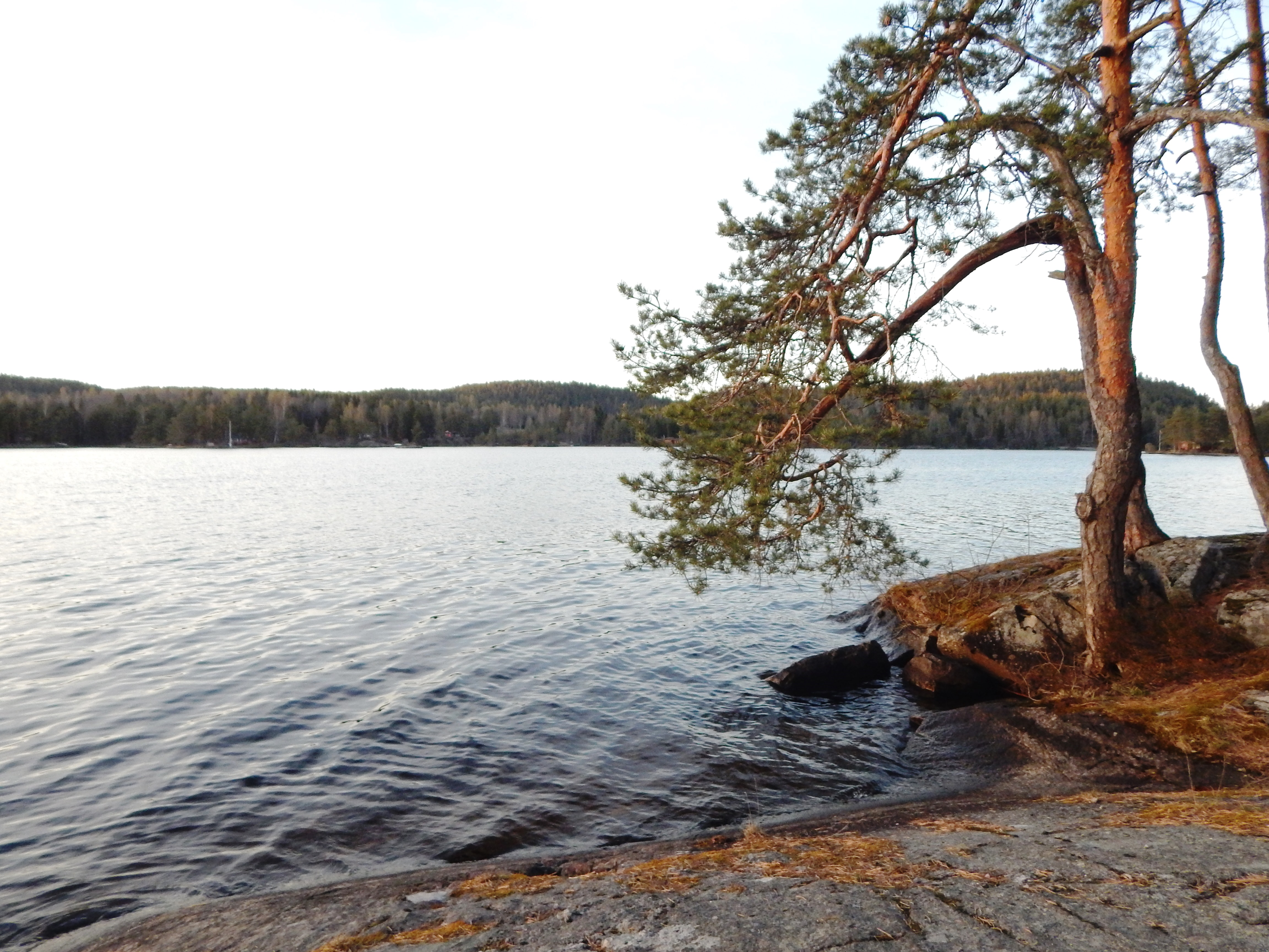 Kilevann like ved Kilebygda kirke